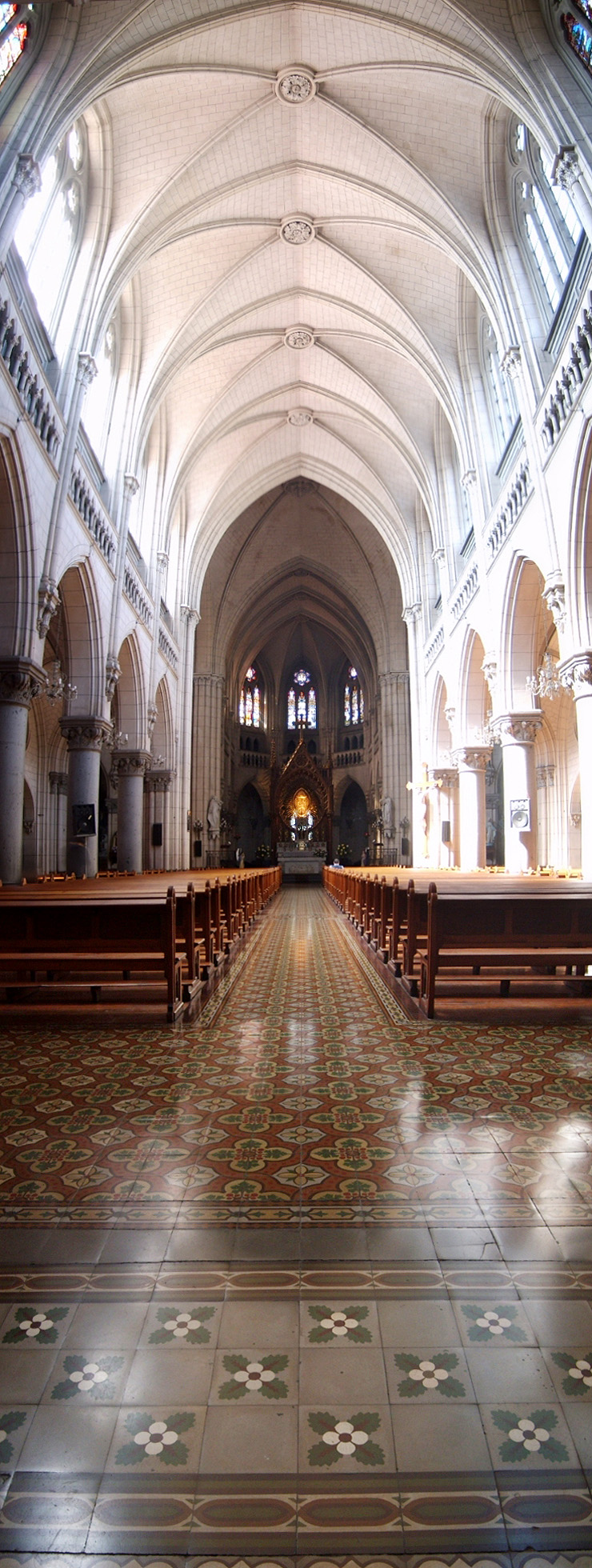 Interior de la Basílica de Nuestra Señora del Perpetuo Socorro, ubicada en la avenida Almirante Blanco Encalada 2950, Santiago de Chile.